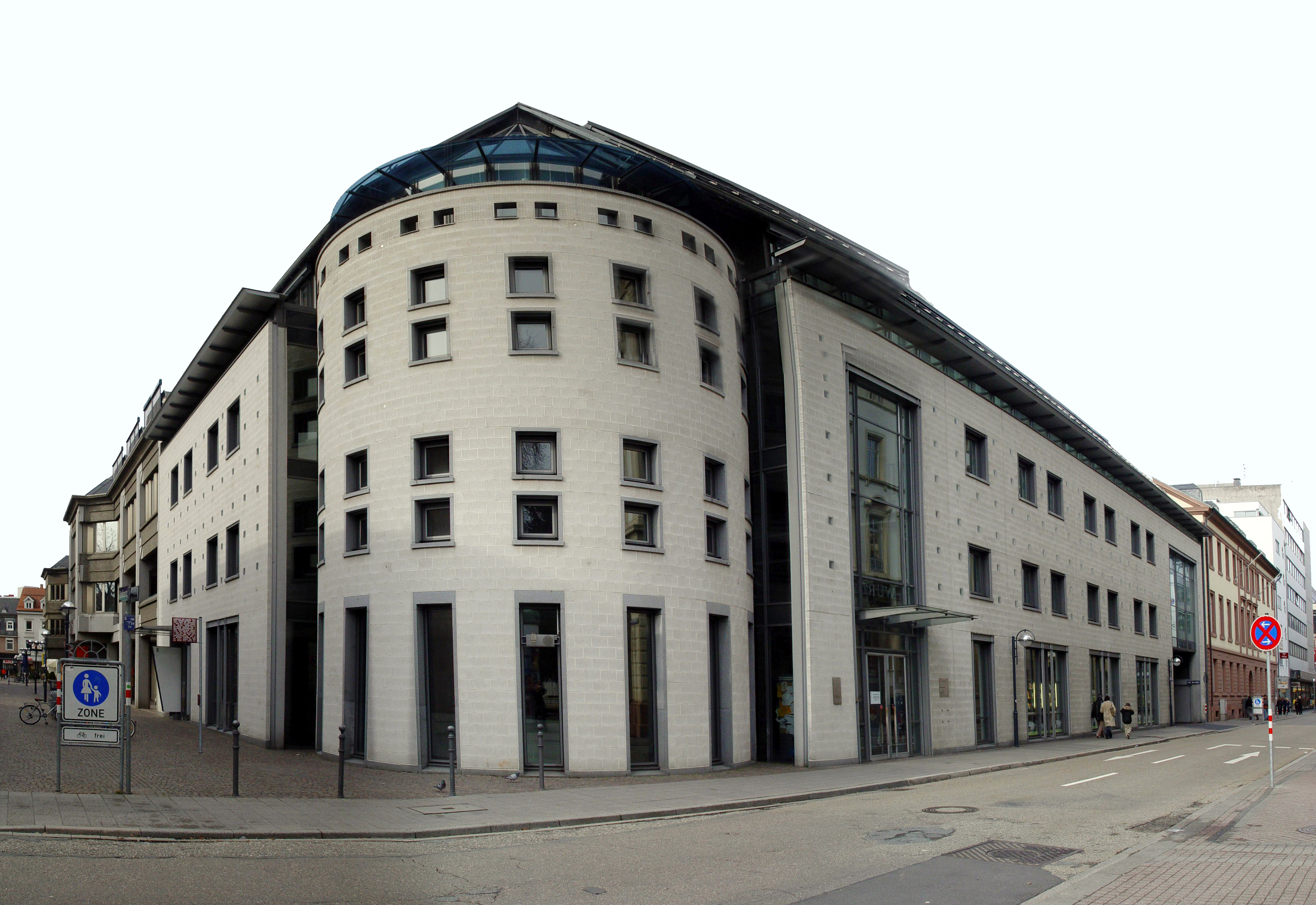 Das Neue Ständehaus in Karlsruhe, das 1993 auf einem Teil des Grundstückes des ursprünglichen Ständehauses, des Tagungsorts der Badischen Ständeversammlung beziehungsweise, ab 1919, des Badischen Landtags, nach Plänen Jürgen Schroeders und des Architekturbüros Planfabrik SPS errichtet wurde (siehe auch